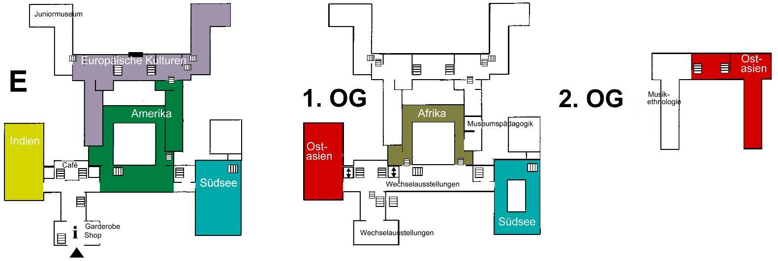 Lageplan Museumszentrum Berlin-Dahlem Zeichnung erstellt am 01.08.2006 von Benutzer:Dr. Meierhofer unter Verwendung des offiziellen Lageplans. Ãœbernommen wurden nur die nun mal physisch vorgegebenen Wandlinien. Beschriftung, Schriftgestaltung, Symbole und EinfÃ¤rbung stammen vollstÃ¤ndig vom Ersteller.